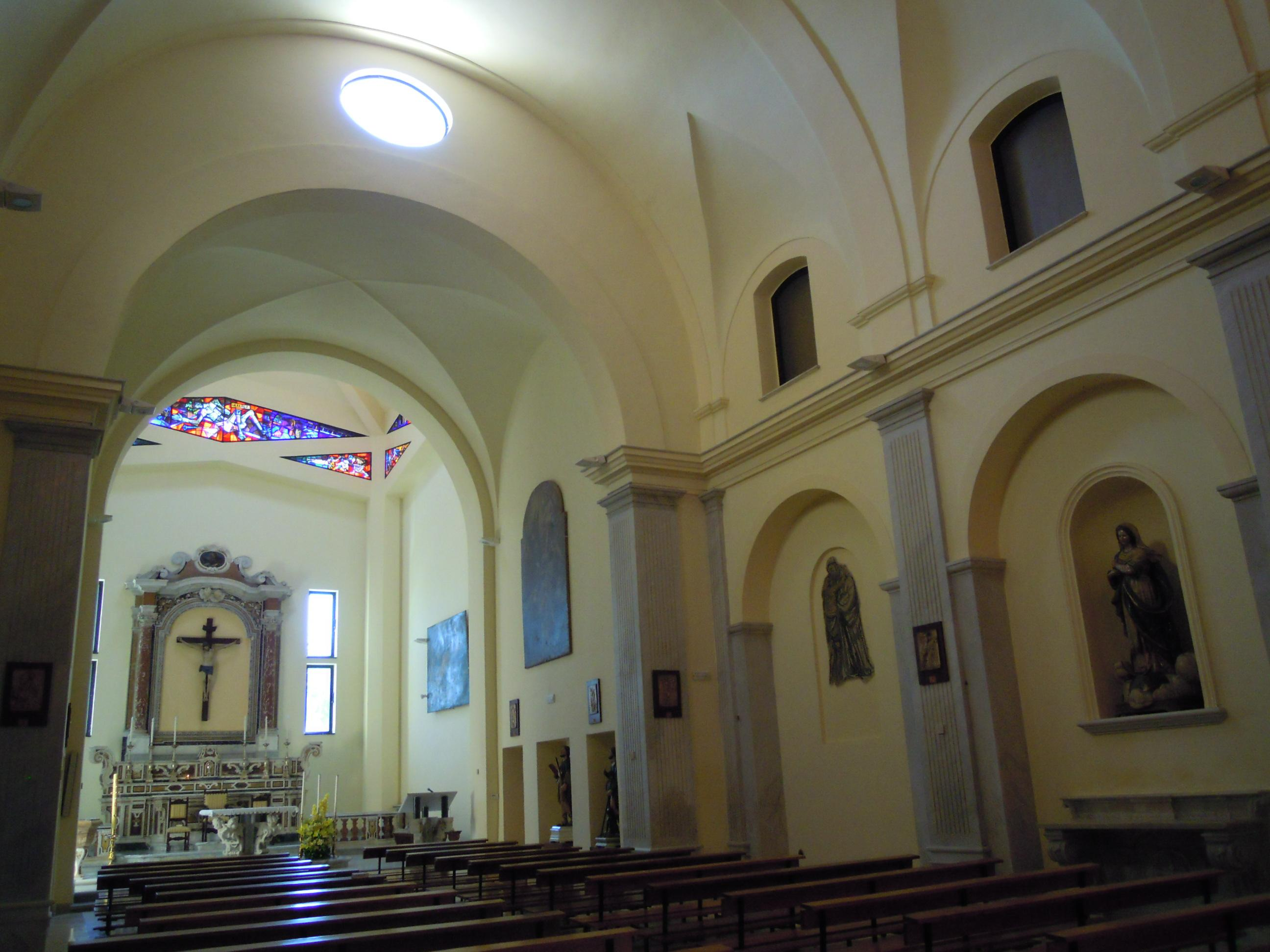 Interno a navata unica della chiesa di San Giacomo a Gaeta